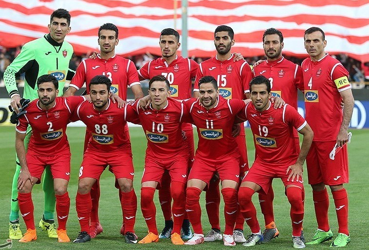 بازیکنان پرسپولیس در مسابقه با الوصل امارات در لیگ قهرمانان آسیا